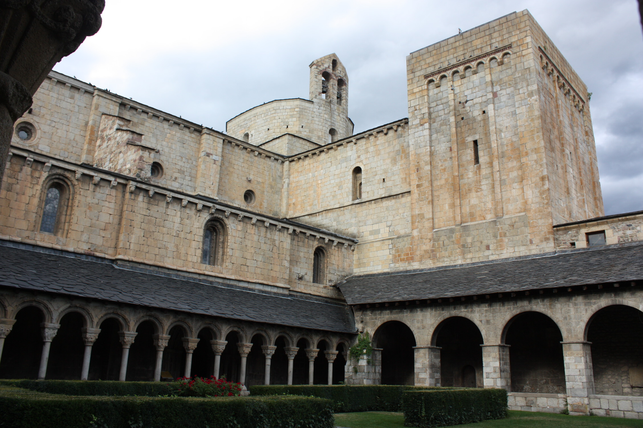 Catedral d'Urgell, claustre.